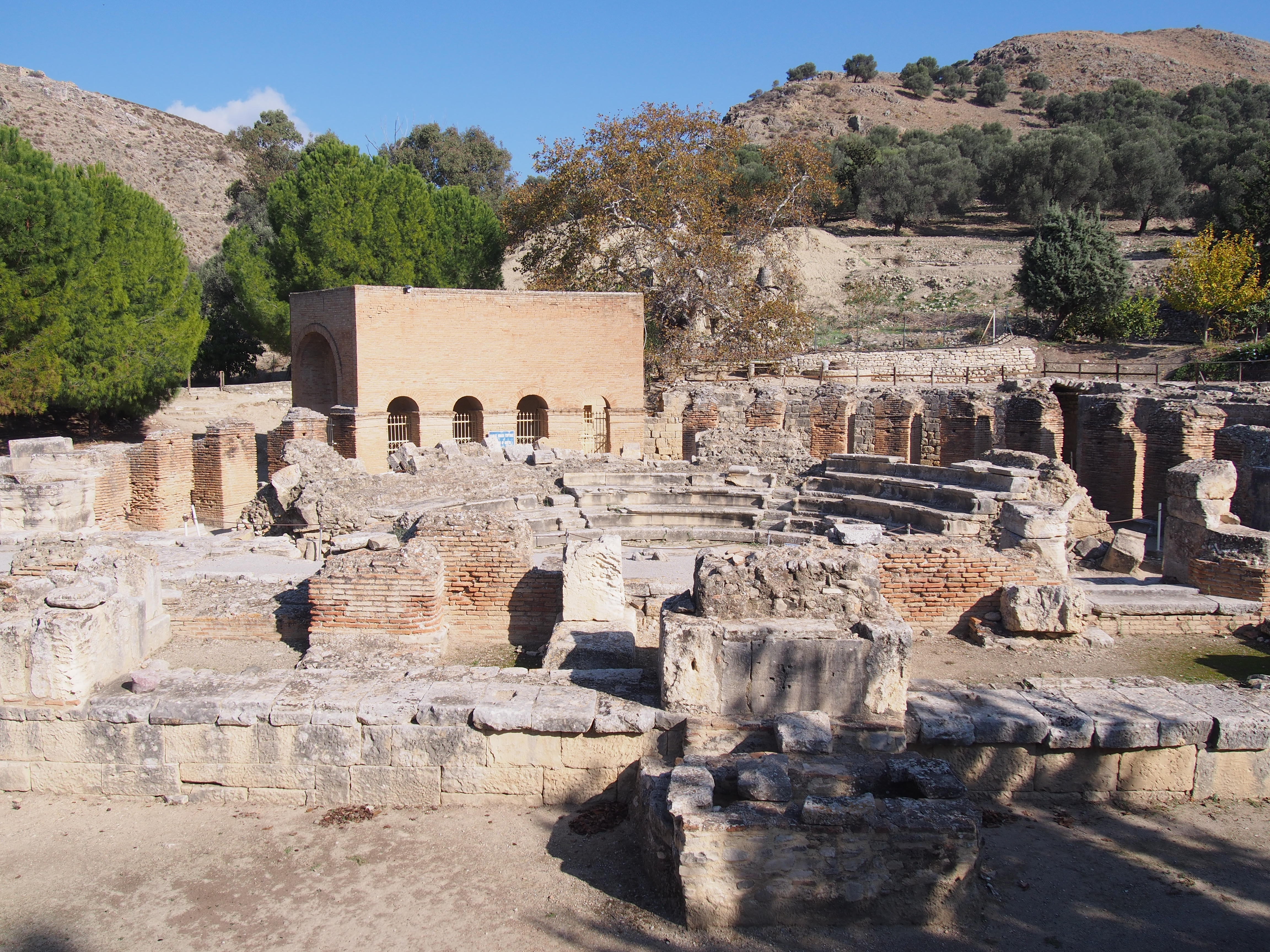 Ωδείο Γόρτυνας«Ωδείο Γόρτυνας»